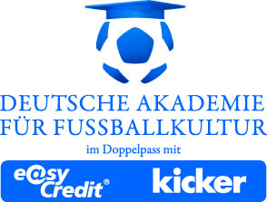 Logo der Deutschen Akademie für Fußball-Kultur